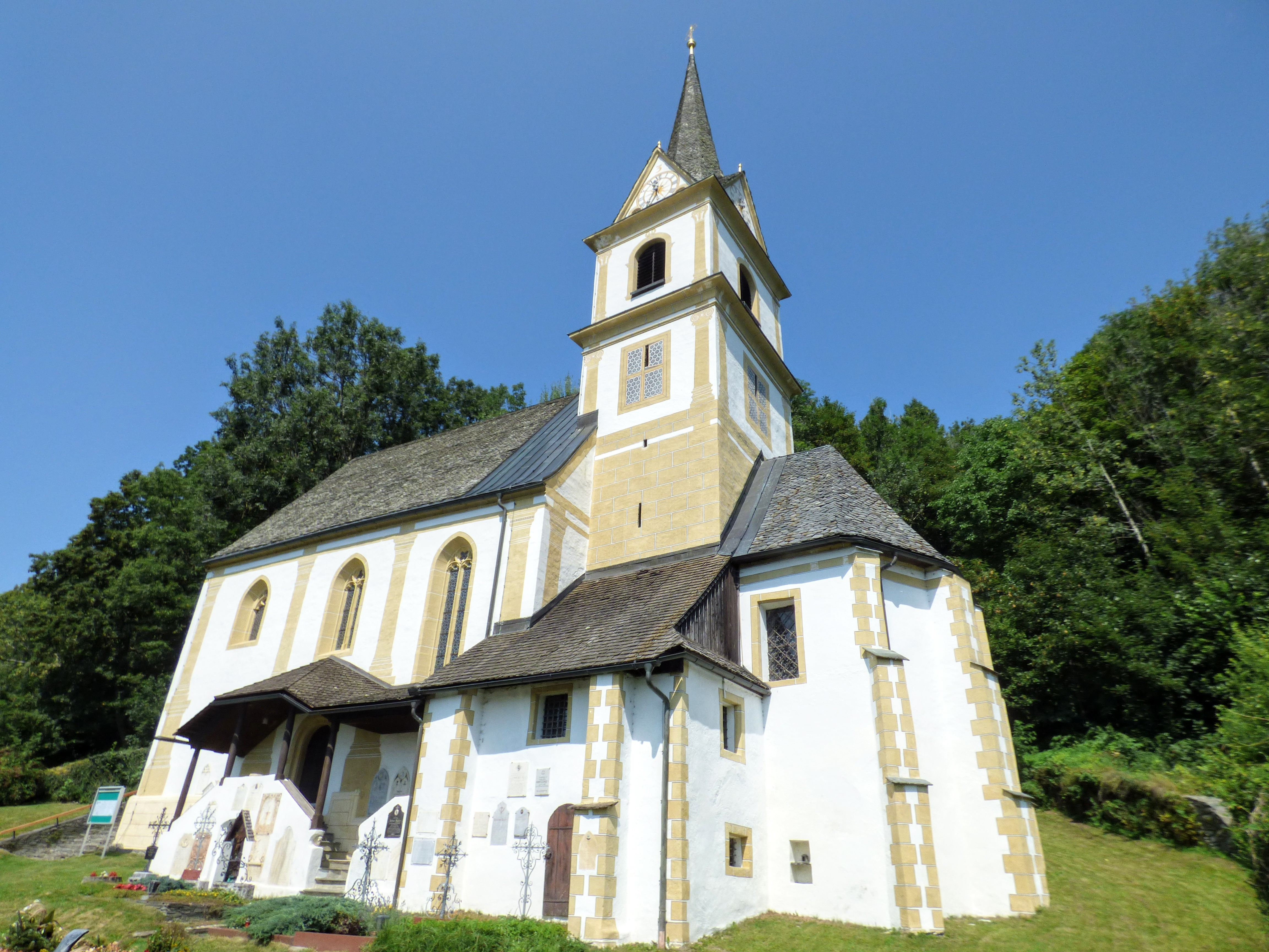 Kath. Pfarrkirche hl. Urban, St. Urban, Kärnten